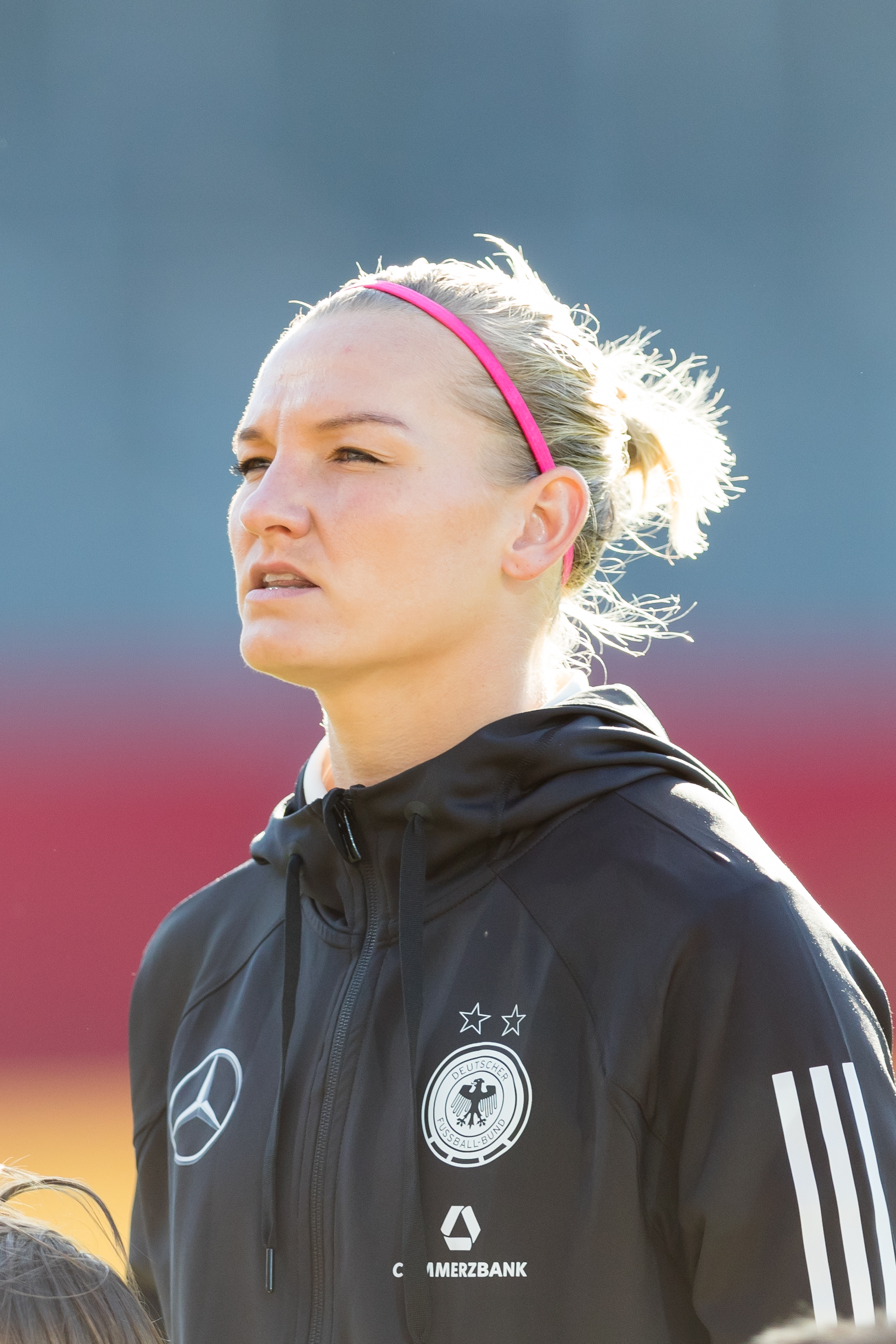 during Fussball Frauen Deutschland vs Island at Brita-Arena, Wiesbaden, Hessen, Germany on 2017-10-20, Photo: Sven Mandel